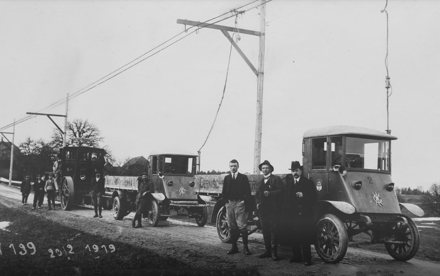 Bild der beiden auf der gleislosen Bahn Gümmenen–Mühleberg Lastwagen, dahinter ein Akkumulatorentraktor. Alle Fahrzeuge wurden von der Fa. Tribelhorn gebaut